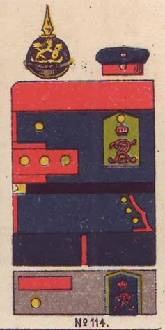 Schematische Farbdarstellung der Uniformen des Infanterie-Regiments „Kaiser Friedrich III.“ (6. Badisches) Nr. 114.